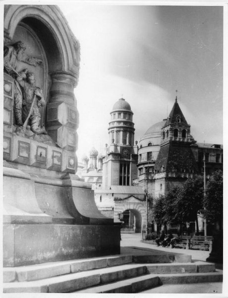 Юрий Ерёмин. Вид в сторону Ильинских ворот Китай-города от памятника-часовни героям Плевны, начало 1910-х годов. МАММ / МДФ